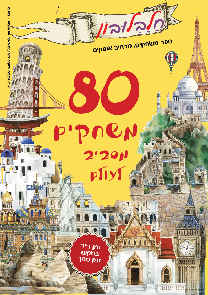 חלבלובון 80 משחקים מסביב לעולם גיליון יולי 2019